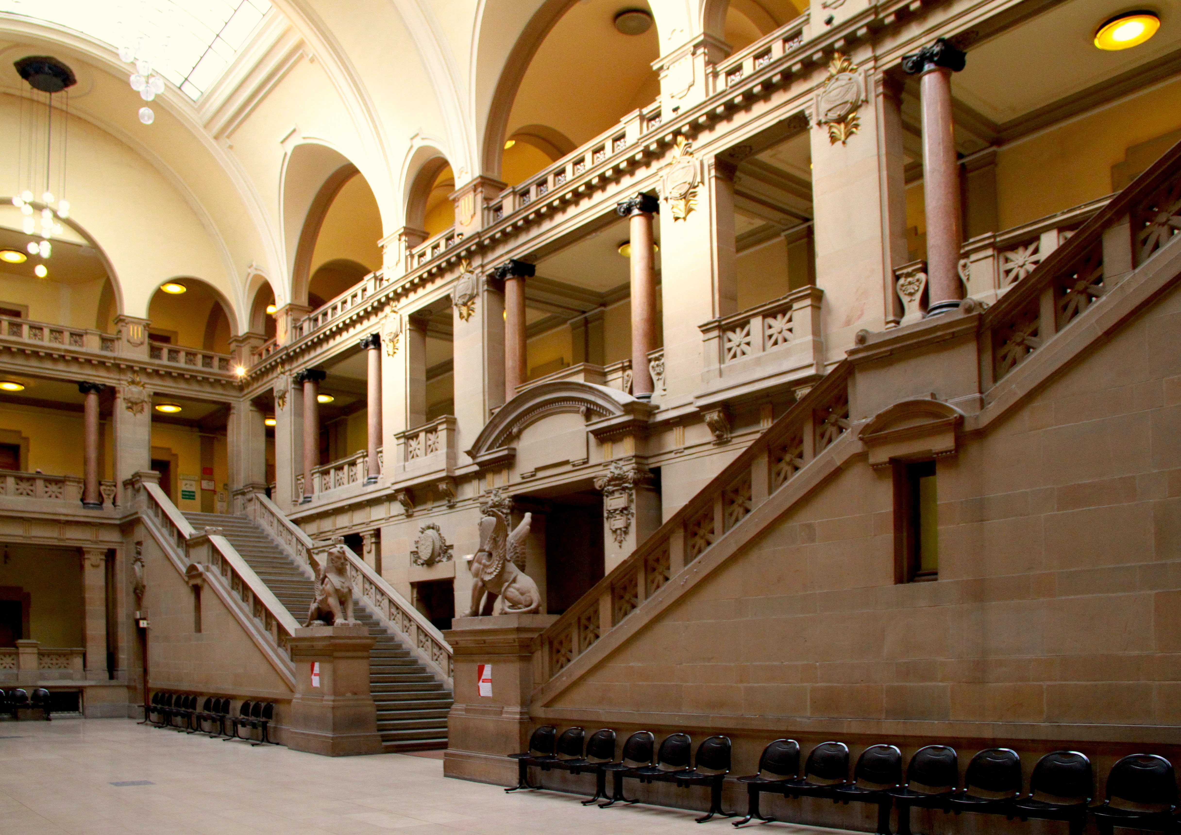 Strasbourg, palais de Justice le grand escalier dans la salle des pas perdus.